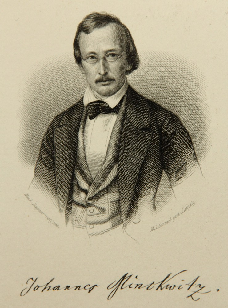 Иоганнес Минквиц (1812—1885) — немецкий филолог, писатель, поэт и переводчик; профессор Лейпцигского университета.